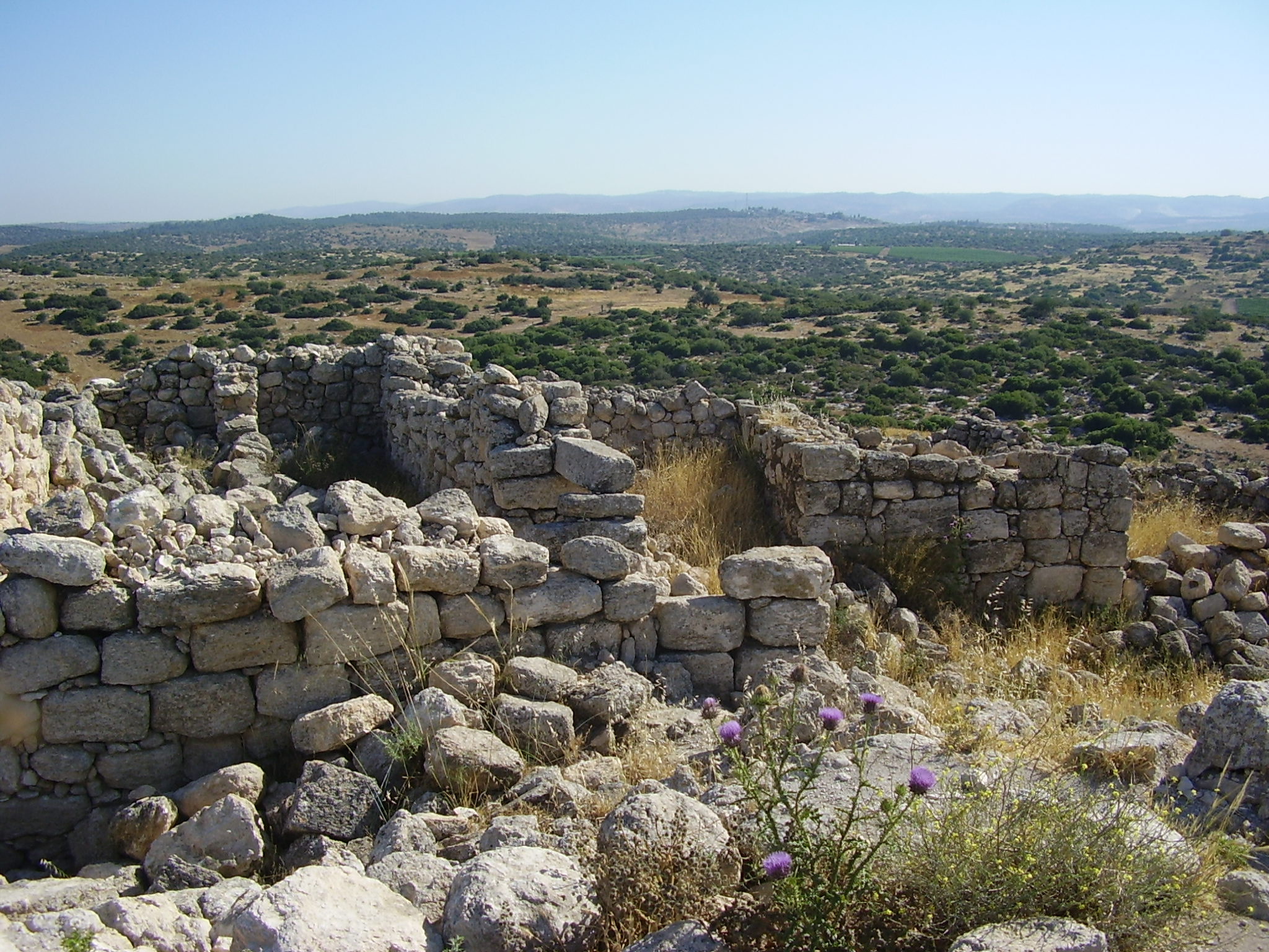 תצפית מפסגת חורבת בורגין